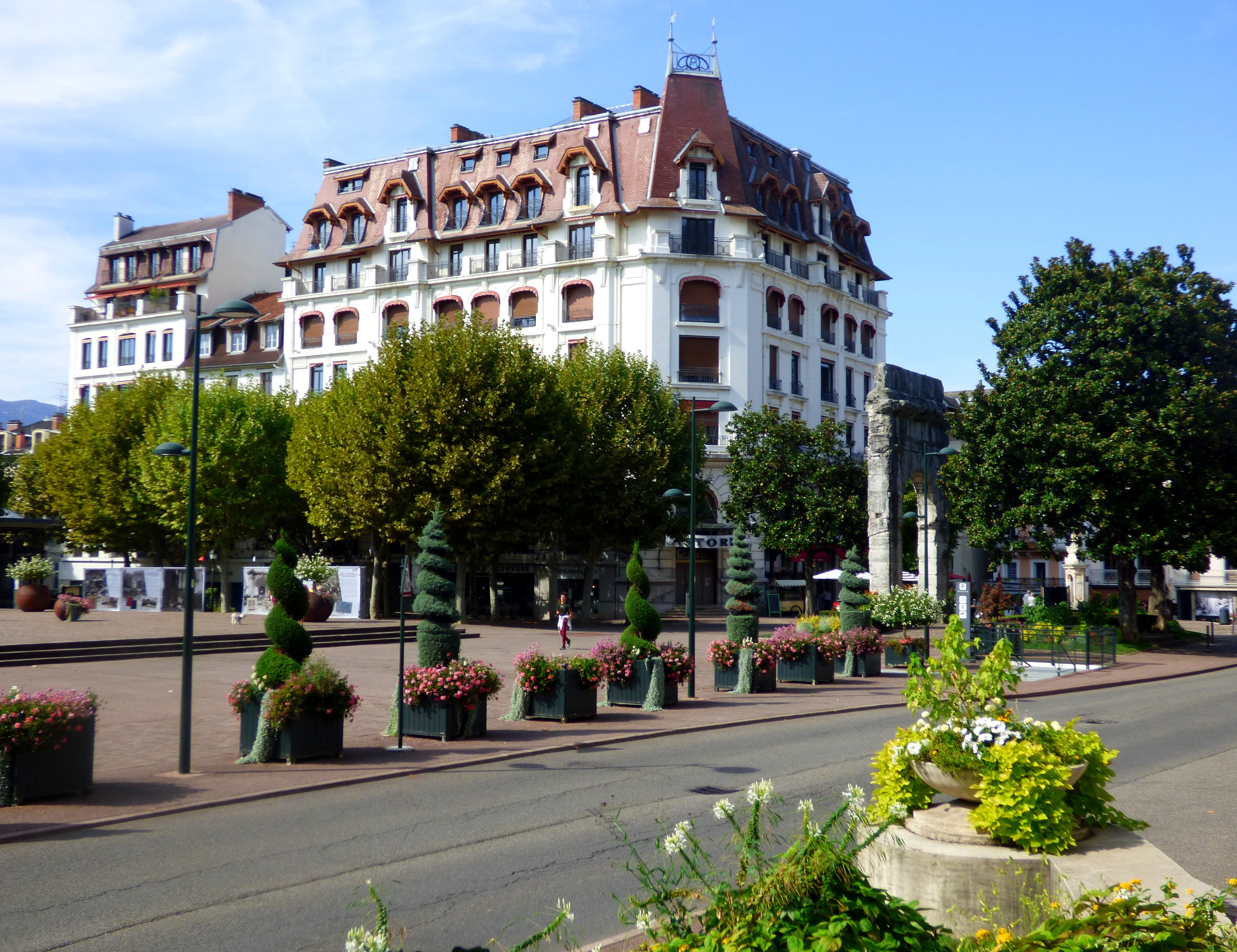 Fleurissement estival sur une partie de la place Maurice-Mollard, à Aix-les-Bains (Savoie), en septembre 2018.